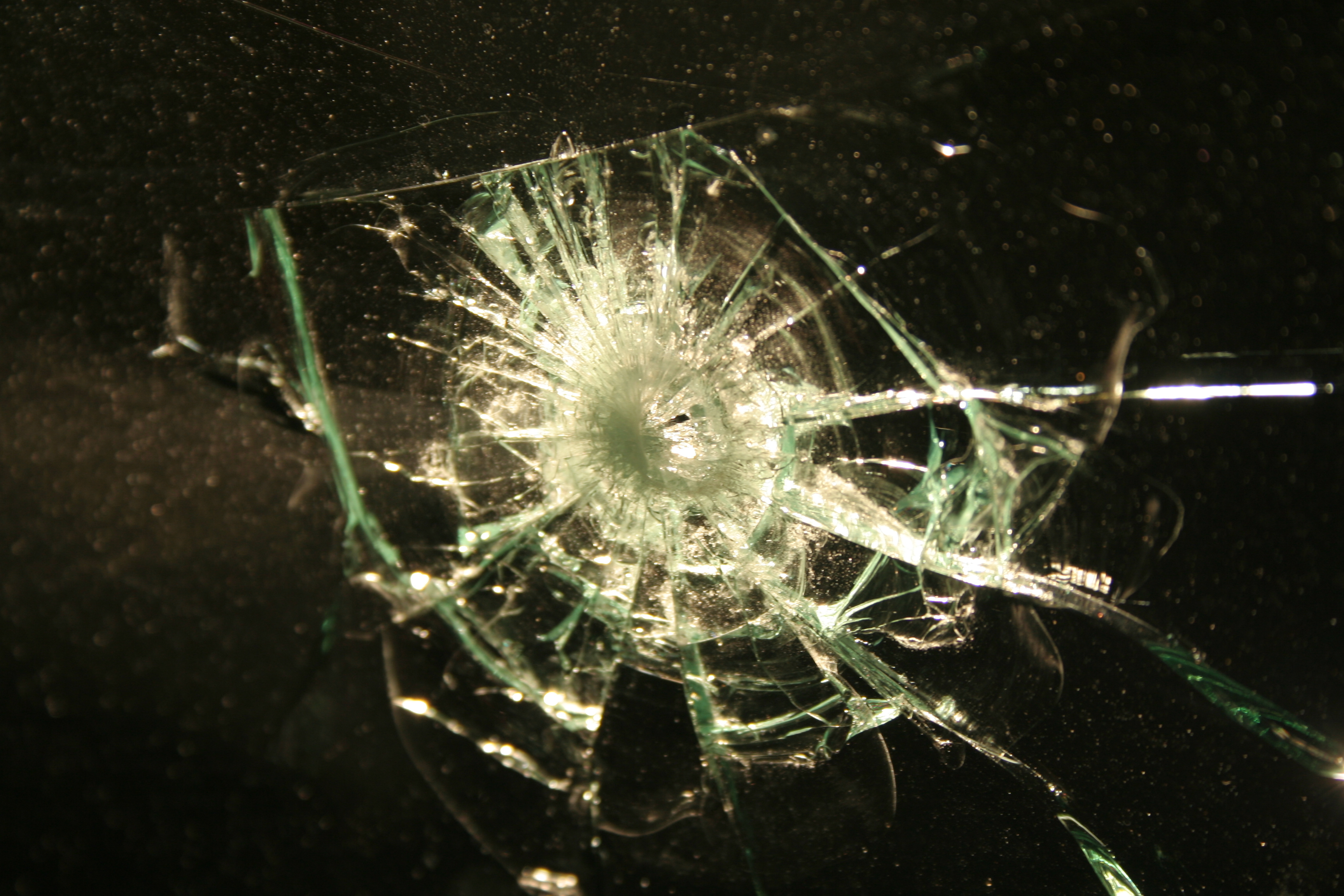 Eclat de verre feuilleté constituant un pare-brise